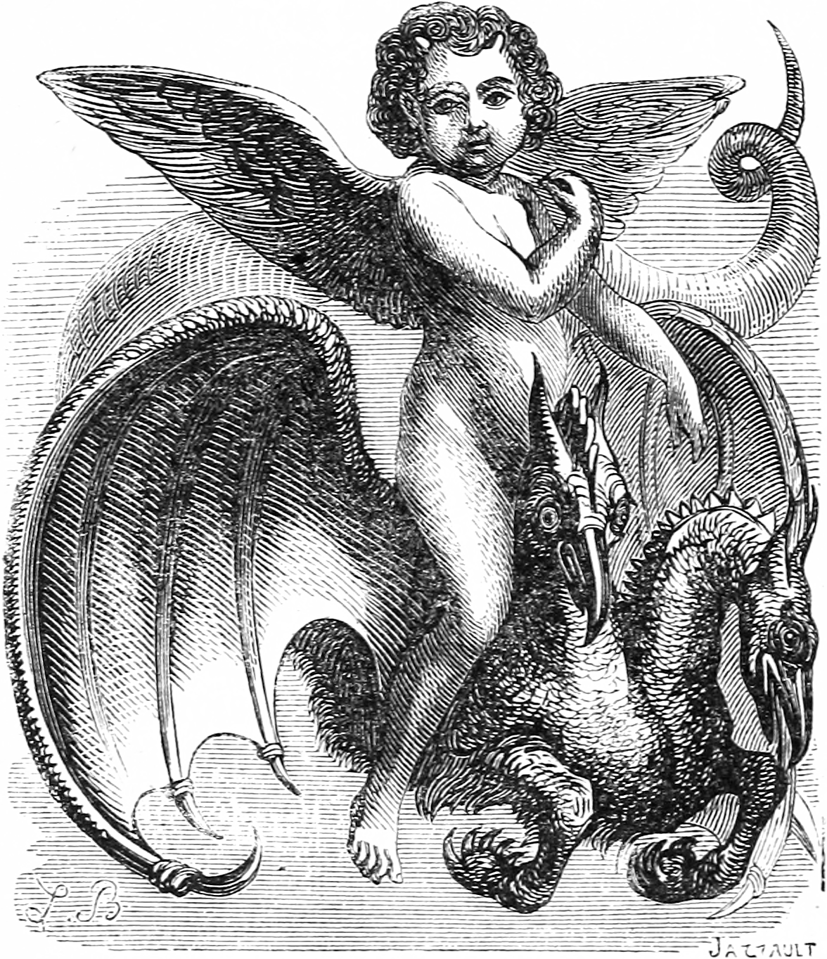 Une illustration pour l’article Volac dans le Dictionnaire infernal par Collin de Plancy.